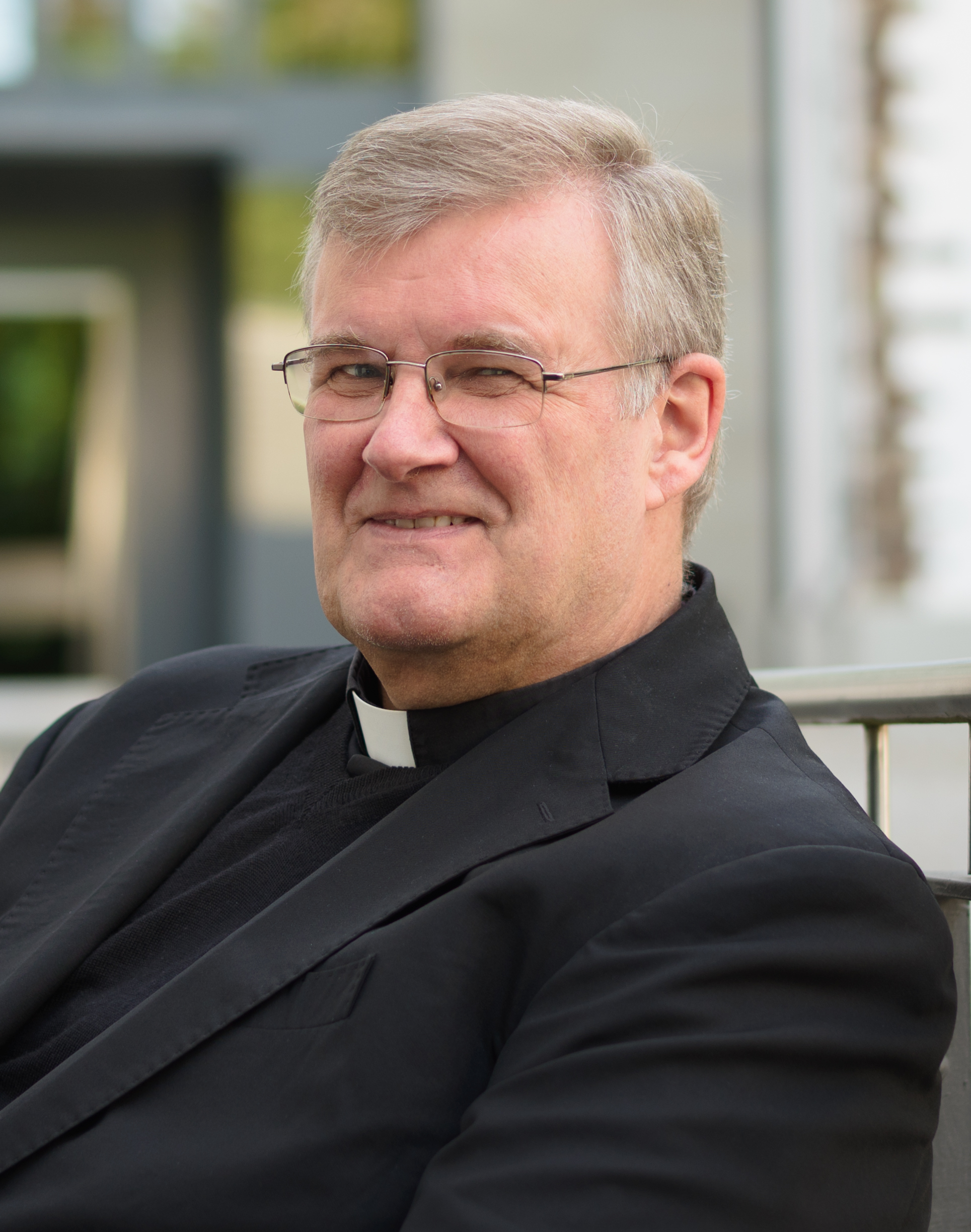 Johannes Grohe, Theologe und Historiker, Professor an der Päpstlichen Universität Santa Croce in Rom